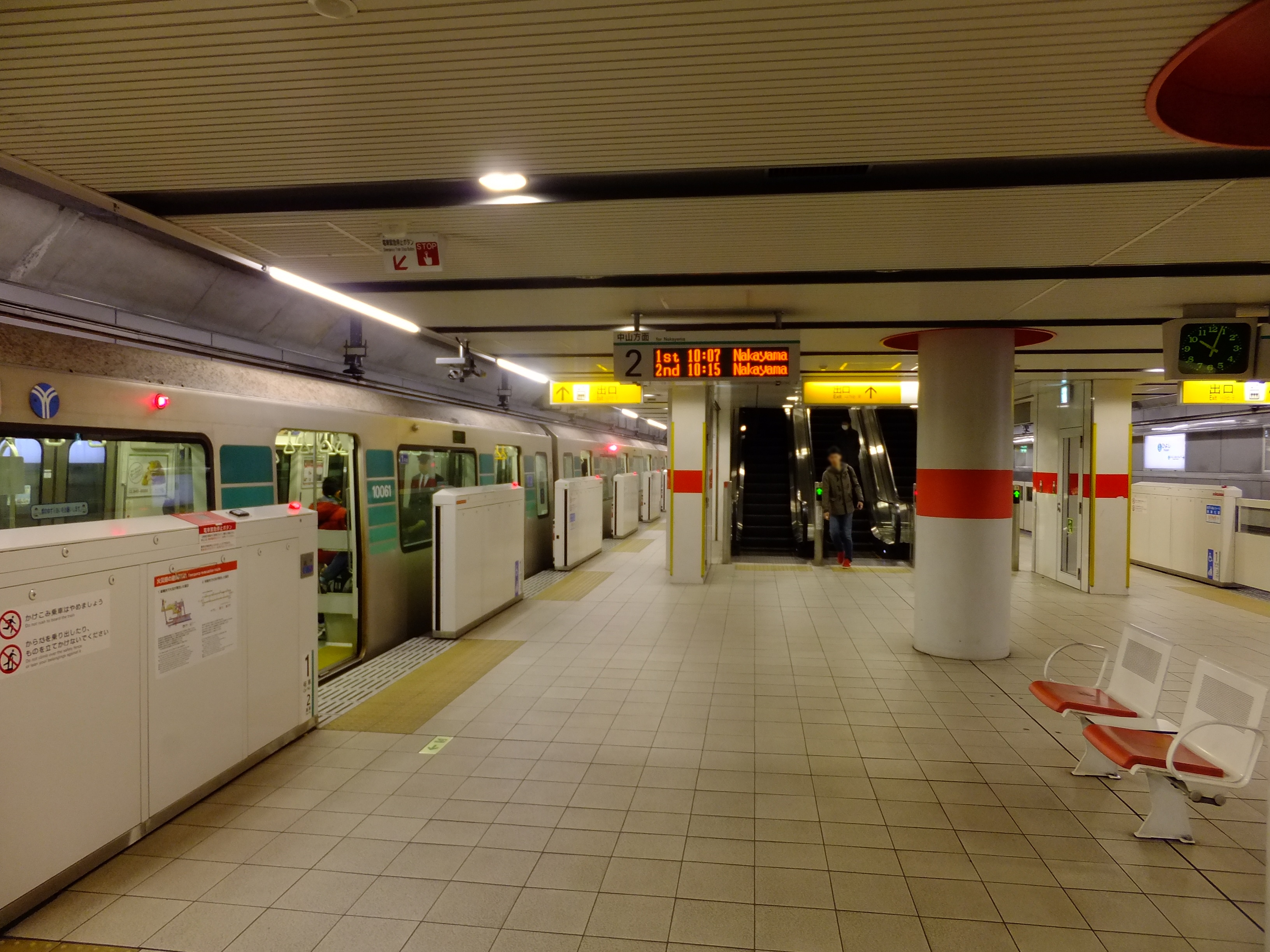 横浜市営地下鉄グリーンライン・日吉駅プラットホーム